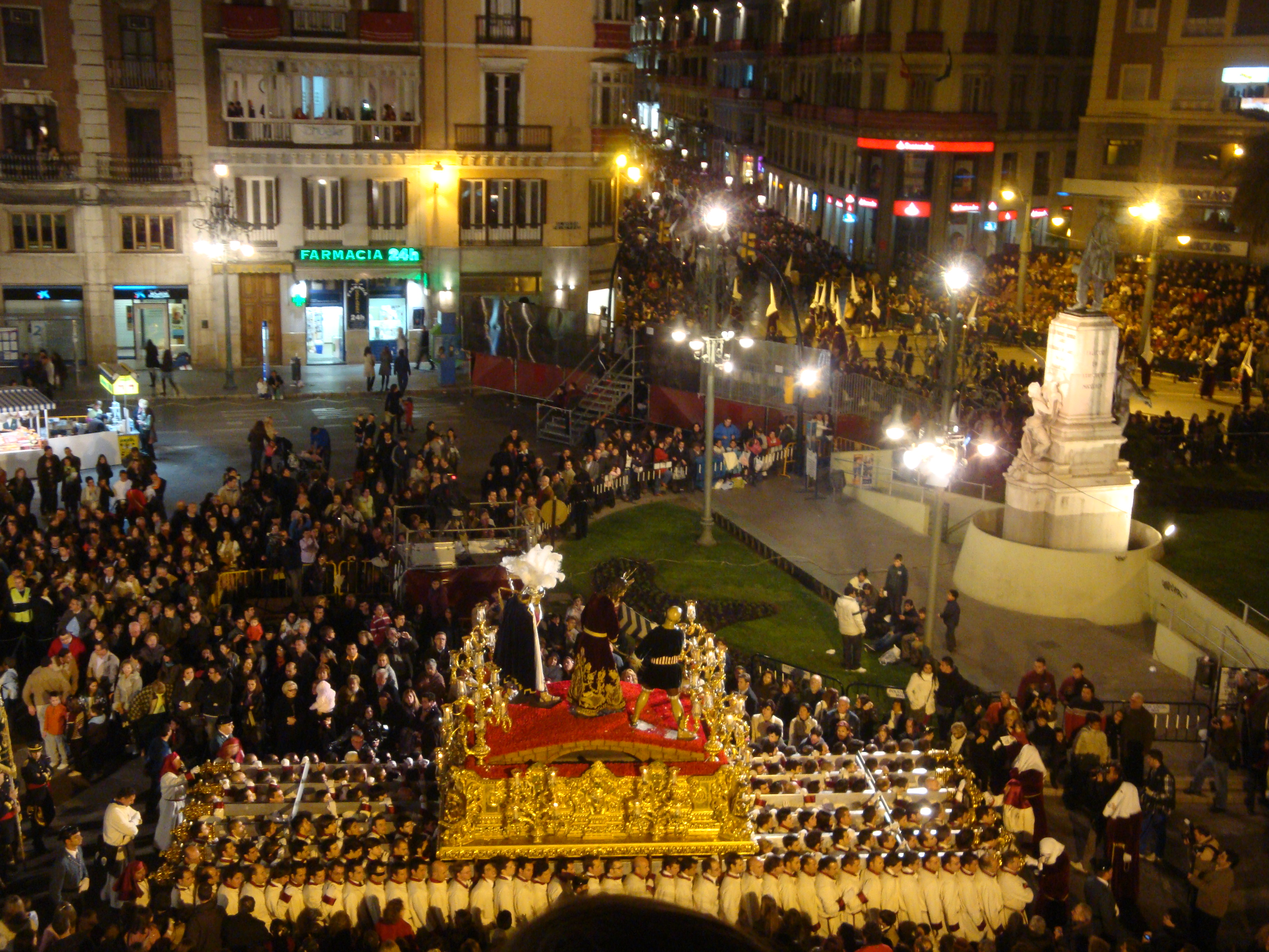 Ntro Padre Jesús de la Puente del Cedrón (Paloma) embocando la curva del Marqués de Larios